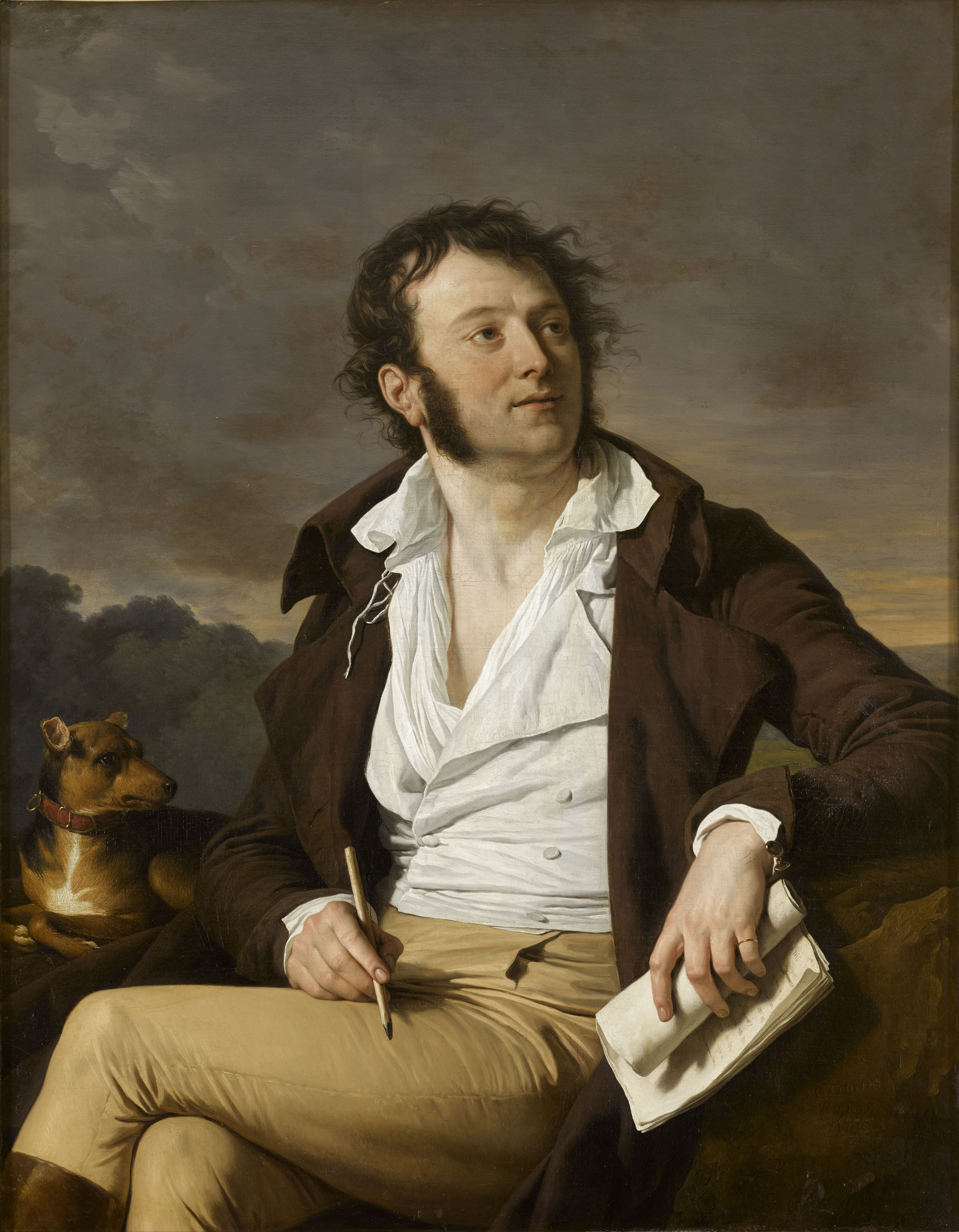 portrait en position assise